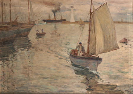 Головков Герасим Семенович На яхте (На ялике). (начало 1900-х., холст, масло, 60х82) в собрании ОХМ